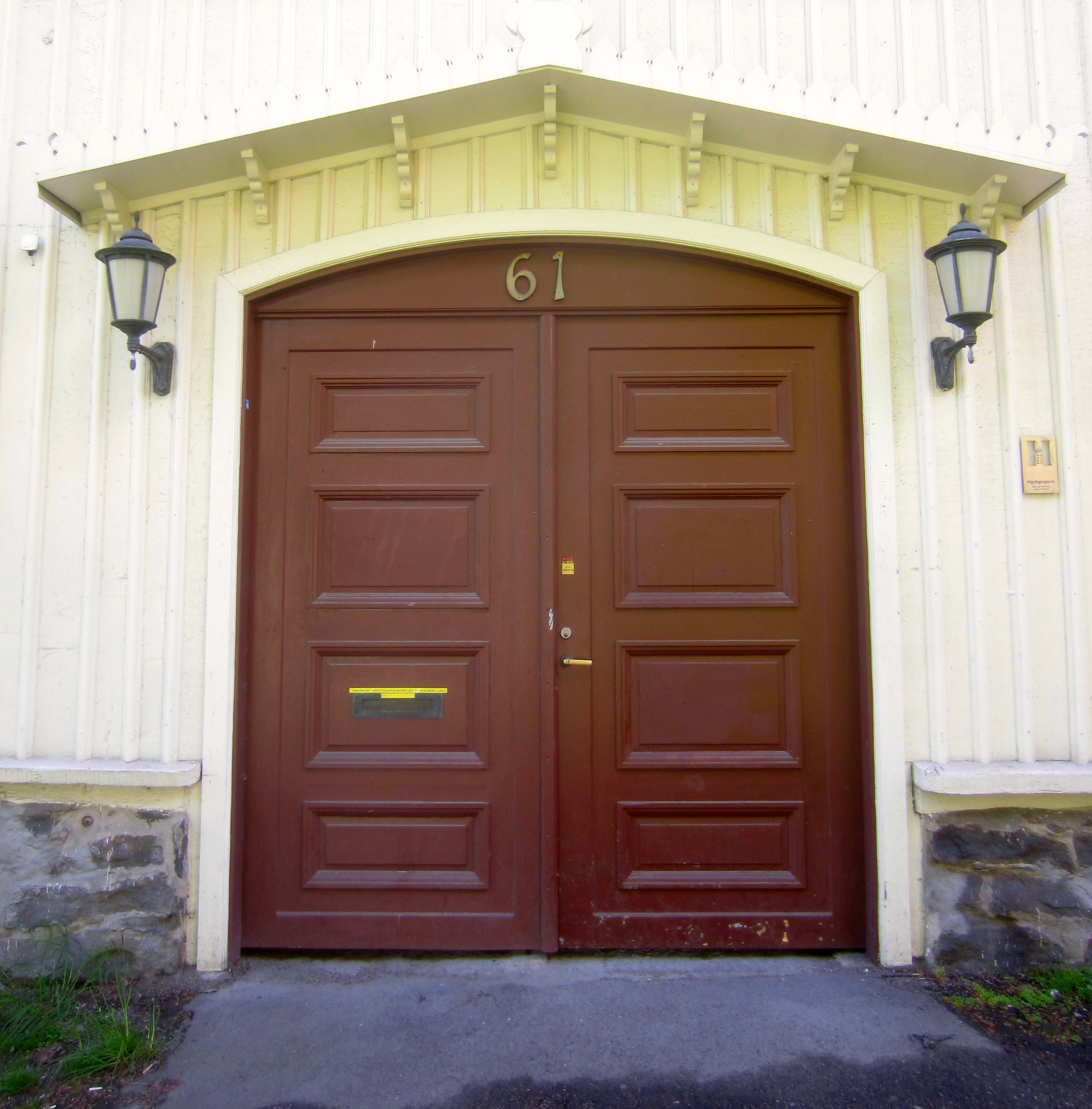 Port till Johannebergs landeri, Södra Vägen 61 i Göteborg.